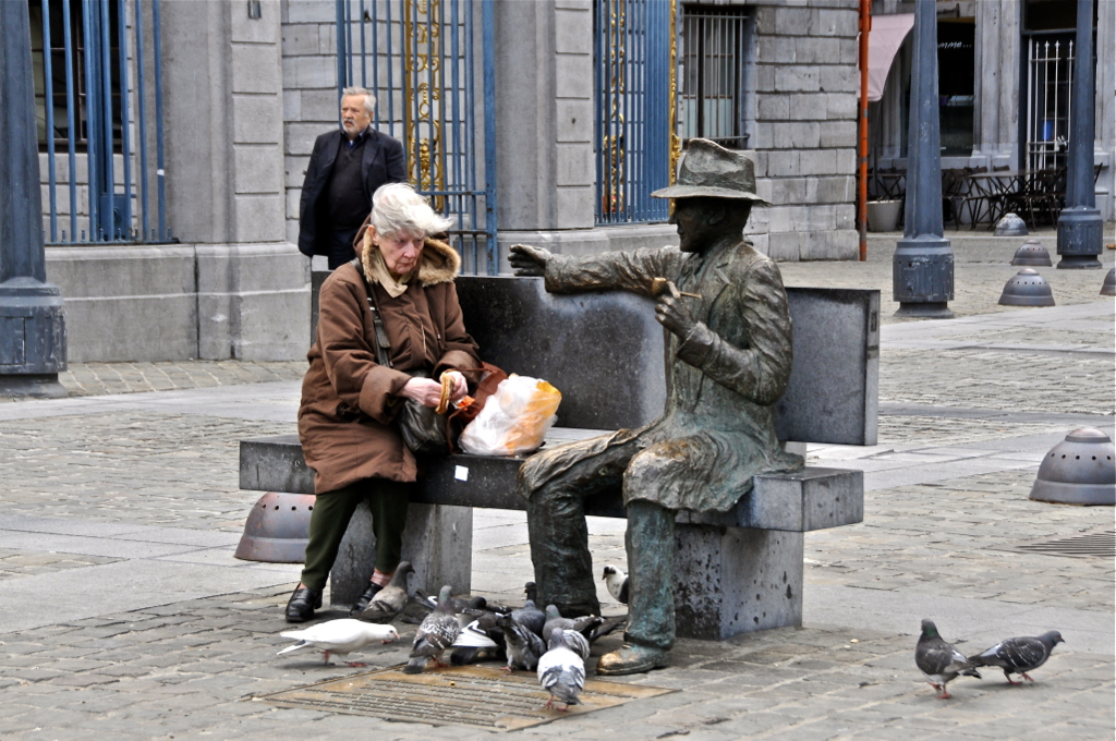 Deze Belgische schrijver werd in 1903 geboren in Luik. Hij overleed in 1989 Lausanne. Hij werd vooral beroemd door zijn vele boeken over inspecteur Maigret.